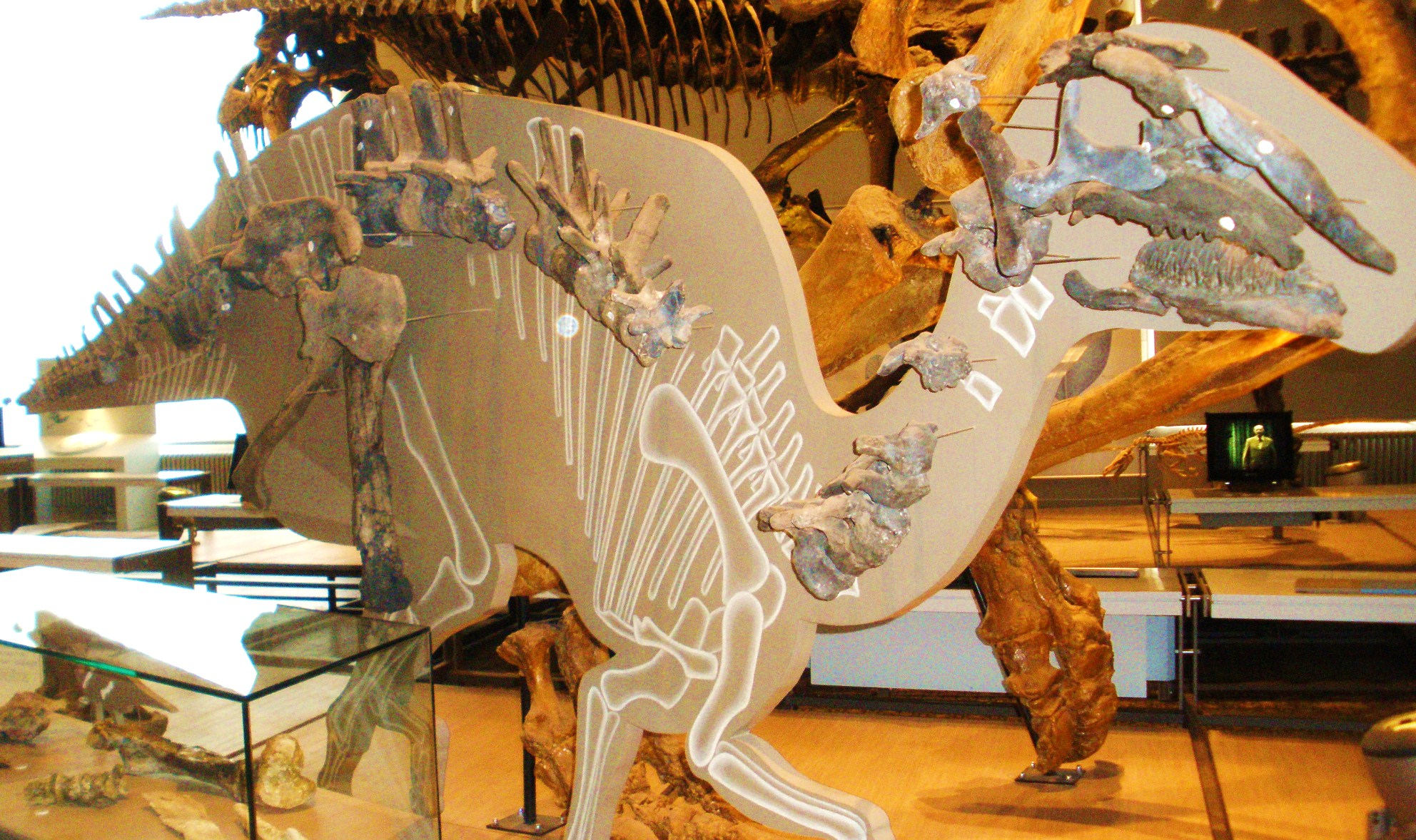 Fossil of Bactrosaurus, a hadrosaurian dinosaur Took the photo at Musee d'Histoire Naturelle, Brussels